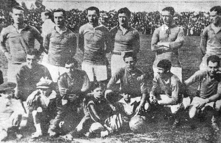 San Lorenzo de Almagro in 1924, Primera División champion.